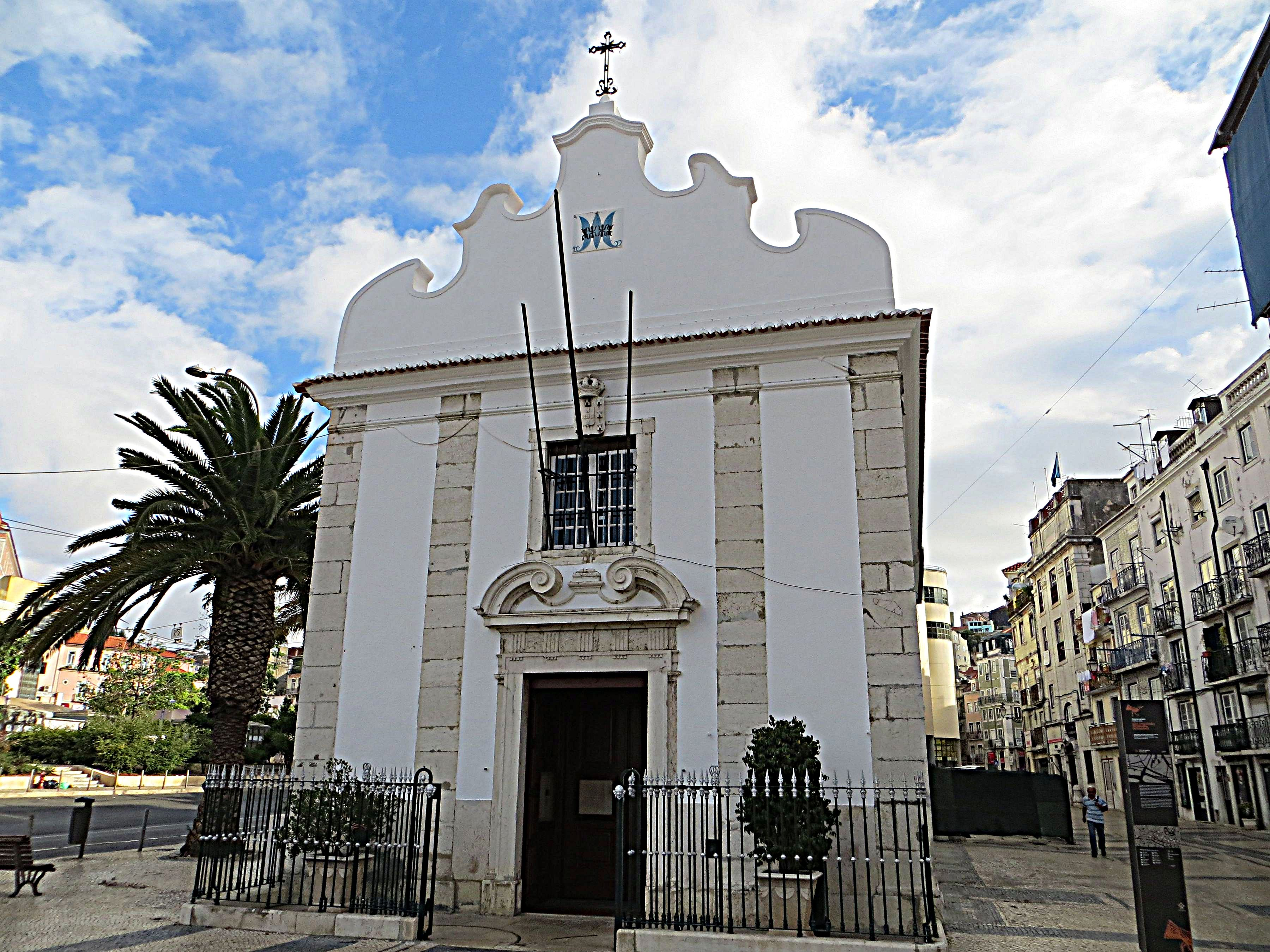 Capela de Nossa Senhora da Saude